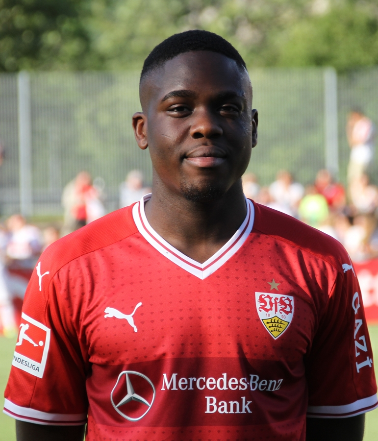 Orel Mangala beim Auftakttraining. Aufgenommen von